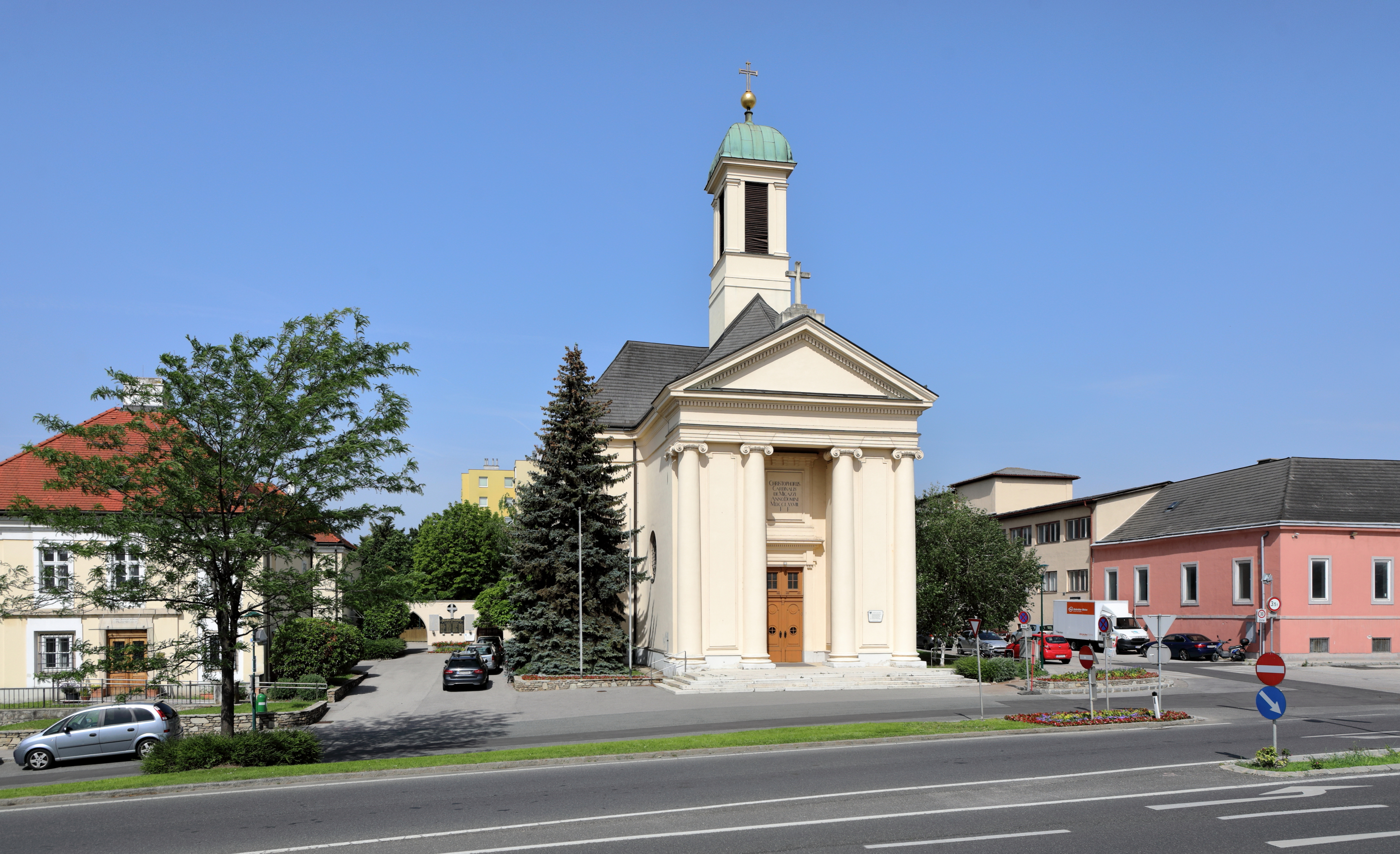 Ostansicht der röm.-kath. Pfarrkirche Maria Schnee in der niederösterreichischen Marktgemeinde Wiener Neudorf.